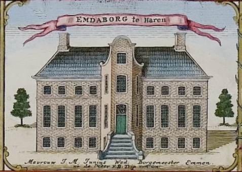 Emdaborg in Haren. Uitsnede uit de kaart van Theodorus Beckeringh uit 1781